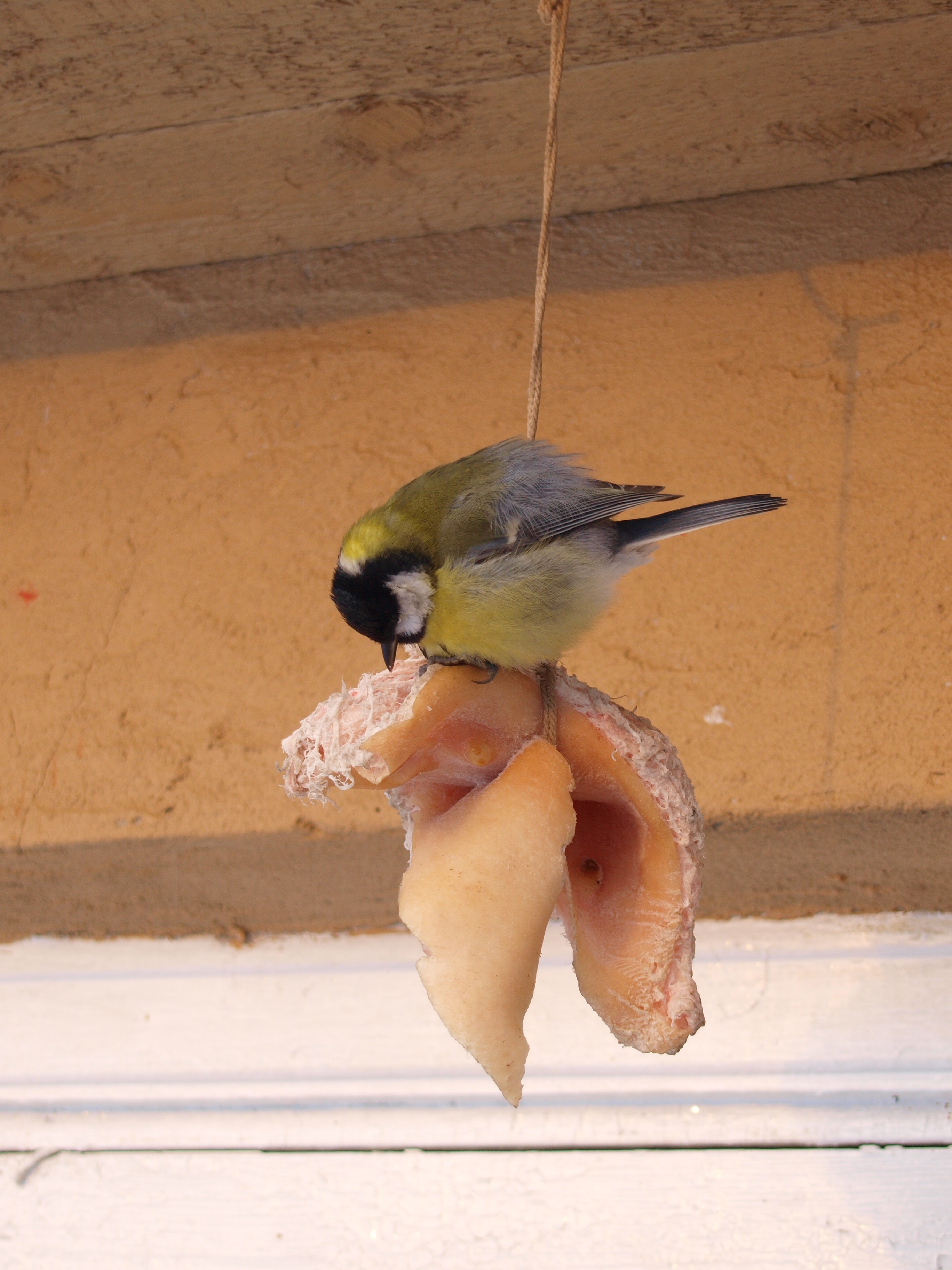 Rasvatihane pekitükil. Pildistatud Perakülas Läänemaal.